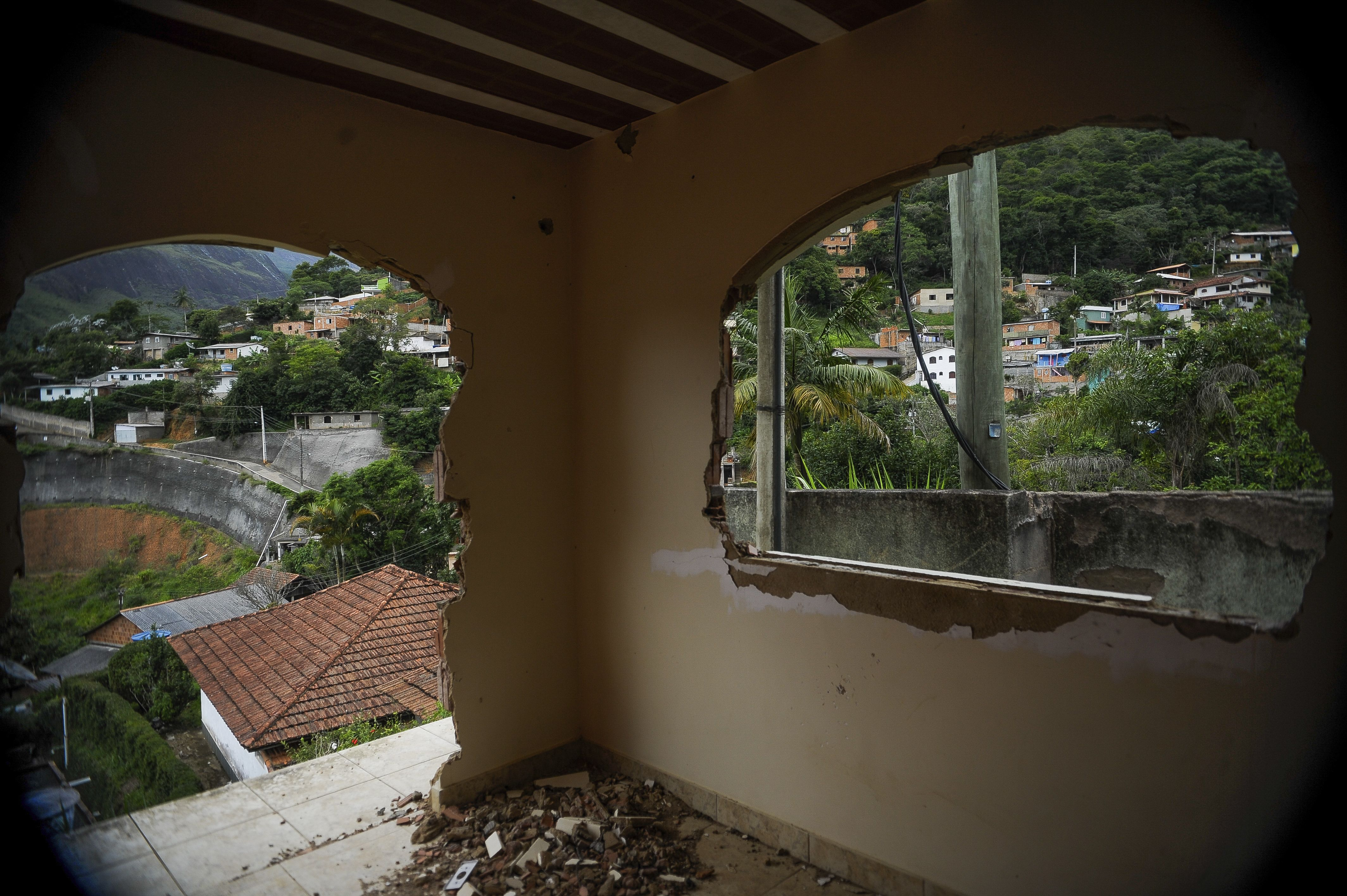 Teresópolis - Casas destruídas e abandonadas no bairro Caleme, atingido pelas fortes chuvas de 2011 (Tomas Silva/Agência Brasil)